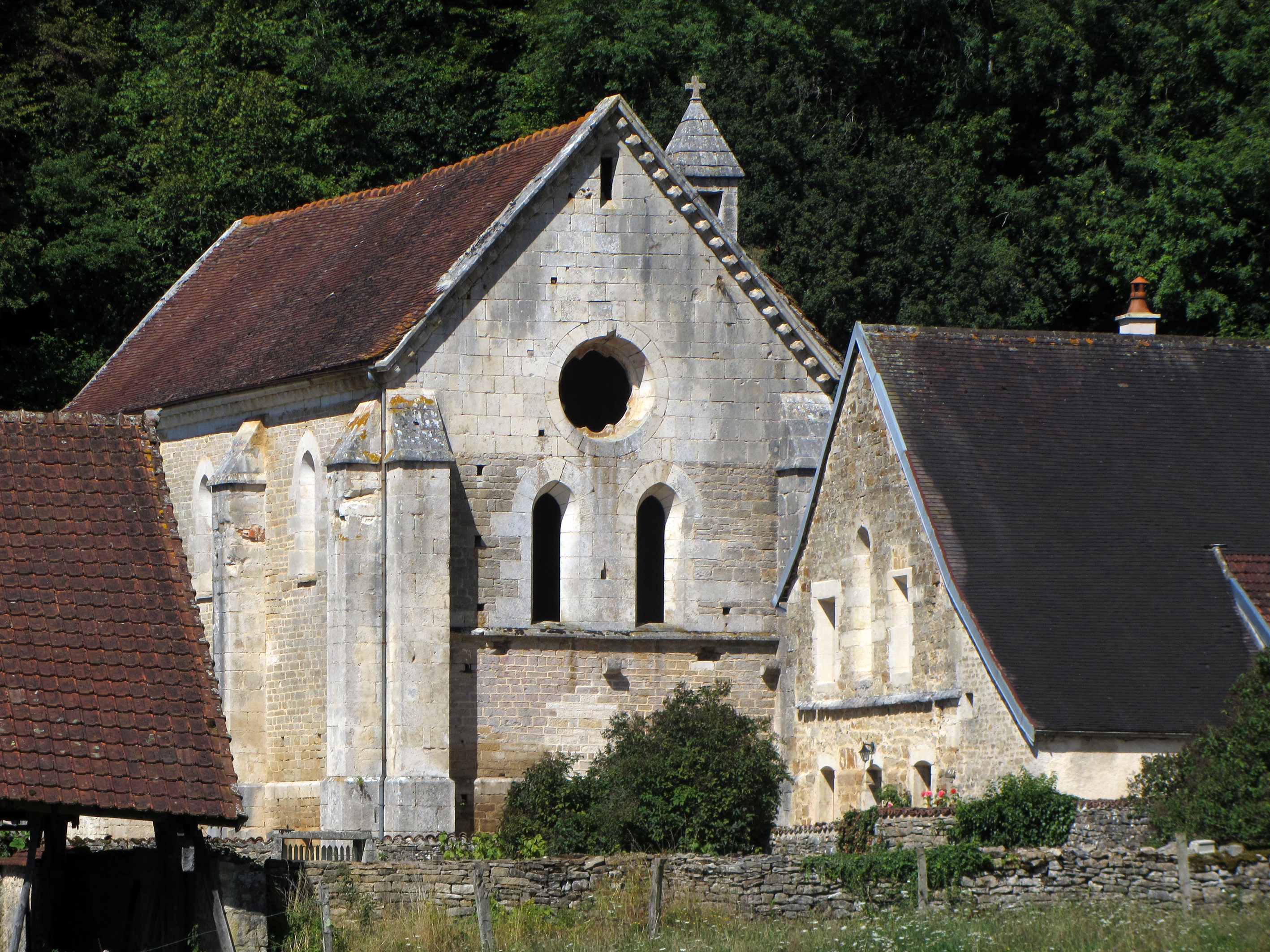 Leuglay, la chapelle de la Courroirie (Côte d'Or)